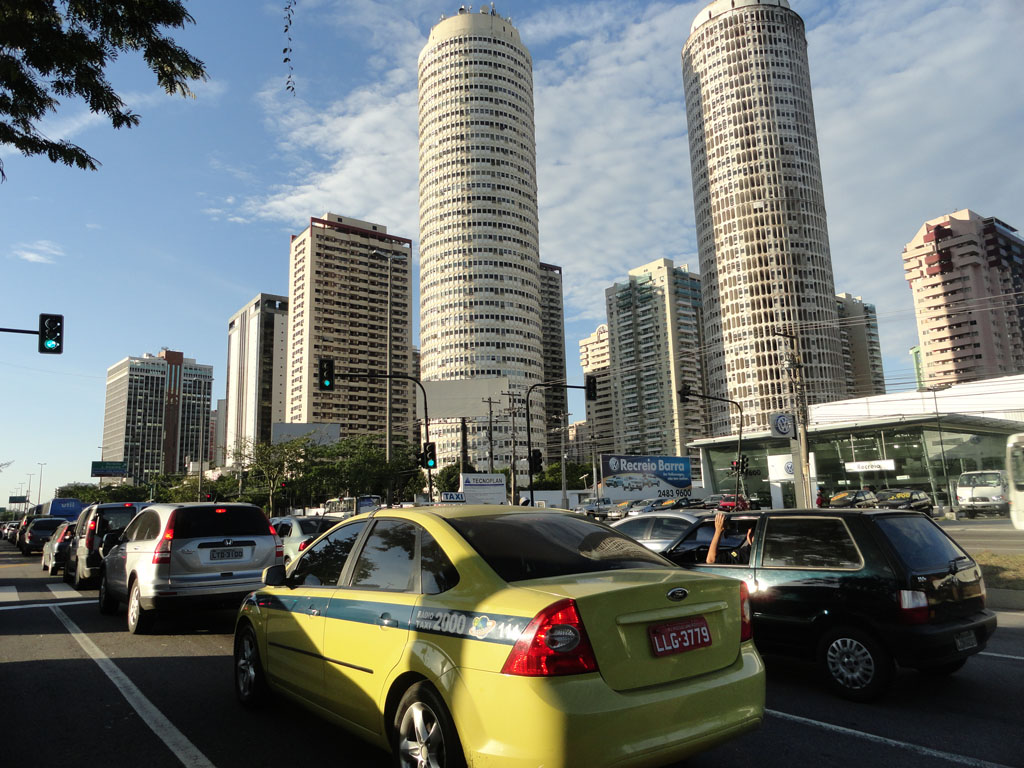 Táxi - Rio de Janeiro, Brasil